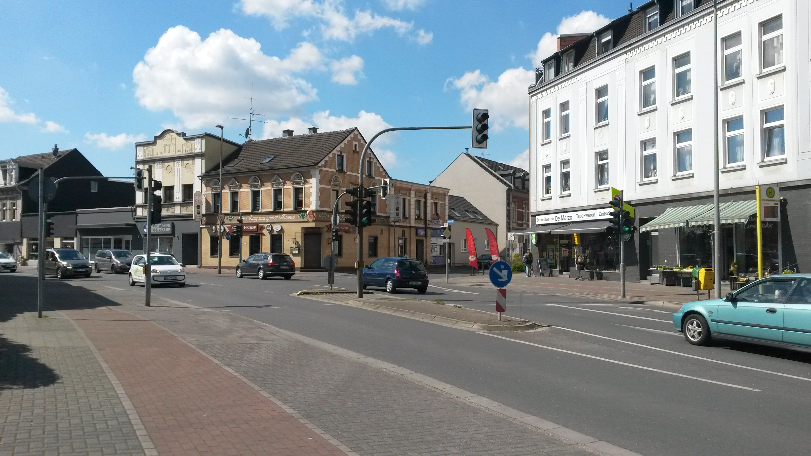 Die Bebelstraße in Alstaden (Oberhausen, NRW); Kreuzung Flockenfeld, Nähe Antoniusplatz